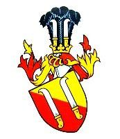 Stammwappen der Herren, Freiherren, Grafen und Fürsten von Dietrichstein